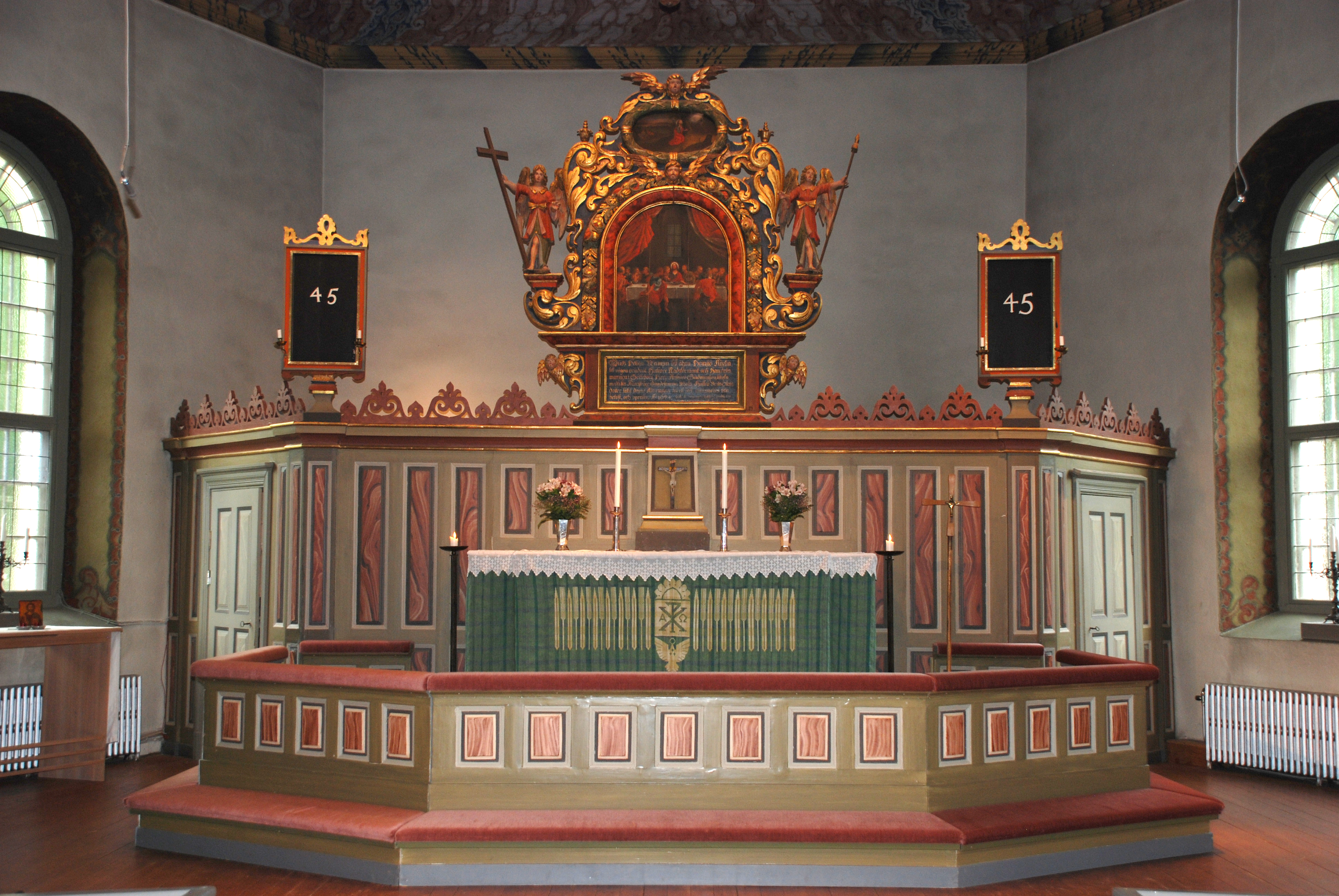 Hemsjö kyrka, församlingskyrka i Hemsjö i Alingsås kommun. Altaruppsatsen från 1674.